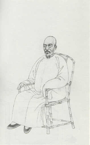 徐壽，清朝學者。Xu Shou